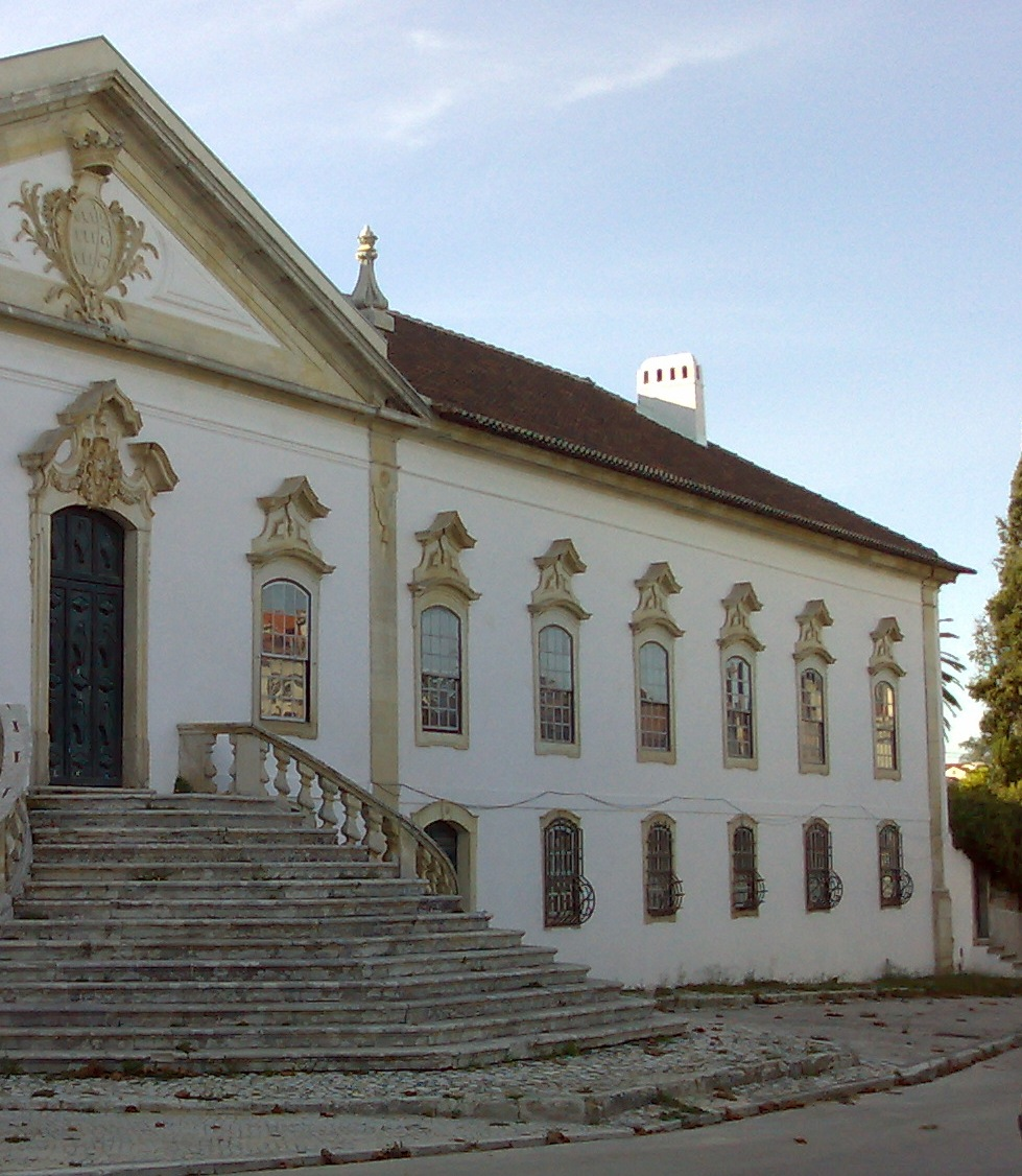 Pormenor do Paço de Maiorca, Maiorca, Figueira da Foz, Portugal